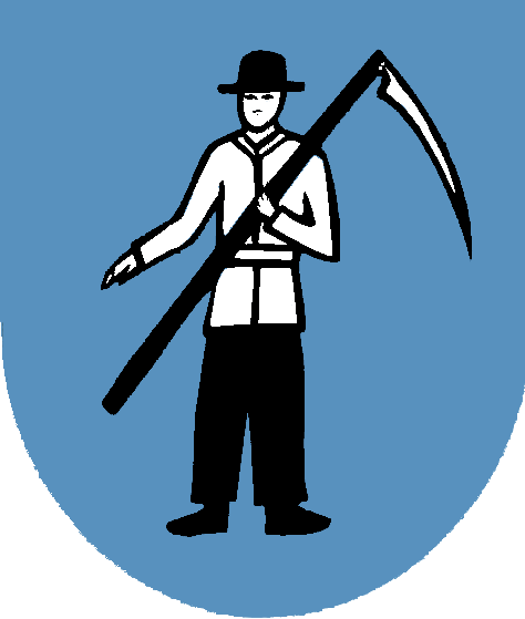 Herb Rudzicy w powiecie bielskim, gminie Jasienica